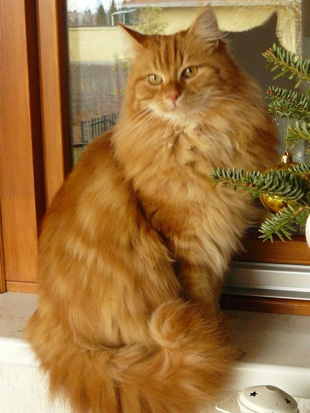 Ankara Kedisi Sarman (Cinober)